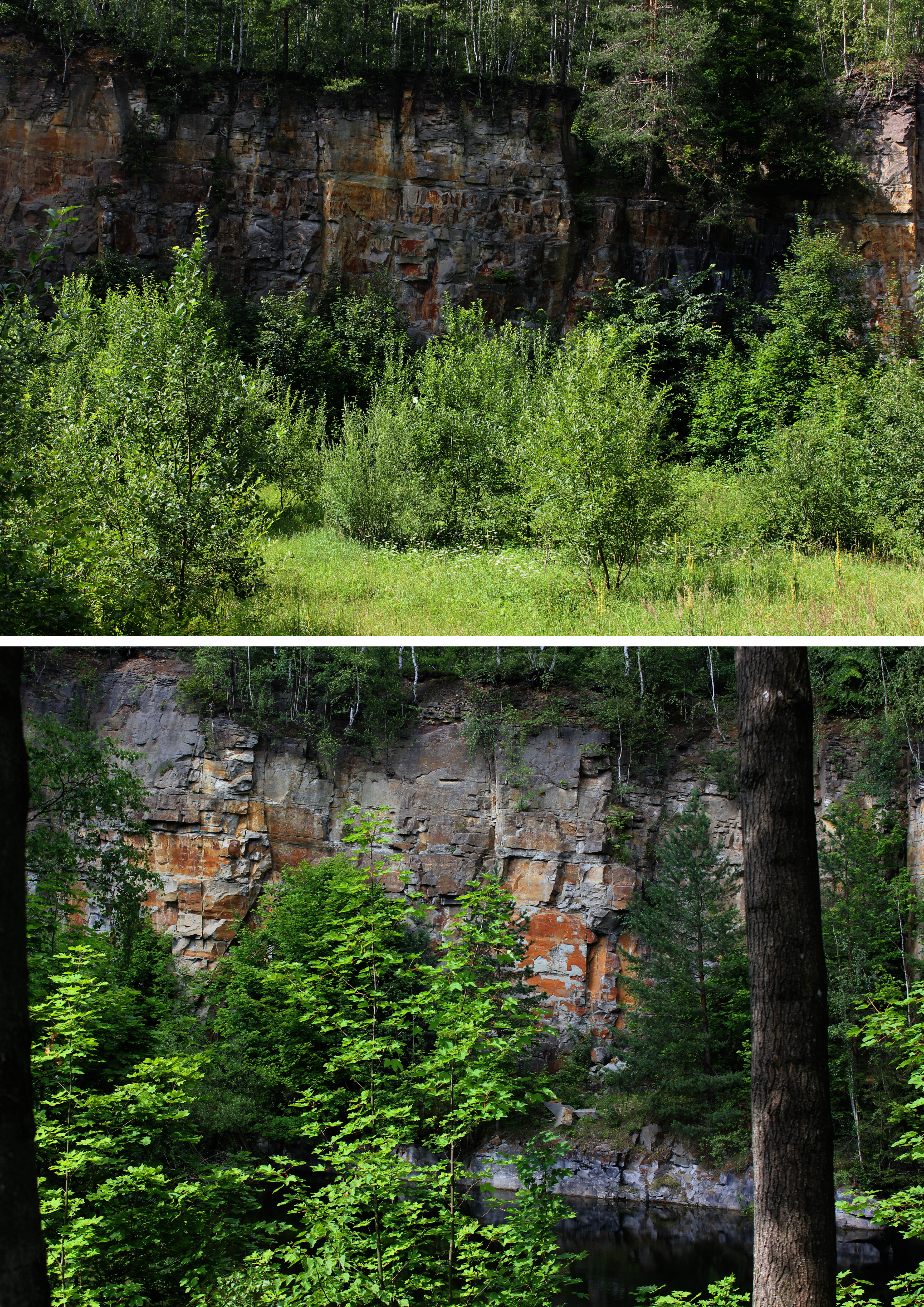 Nieczynna już kopalnia odkrywkowa kamienia. Wewnątrz dawnej kopalni znajduję się niszczejący i opuszczony pensjonat.